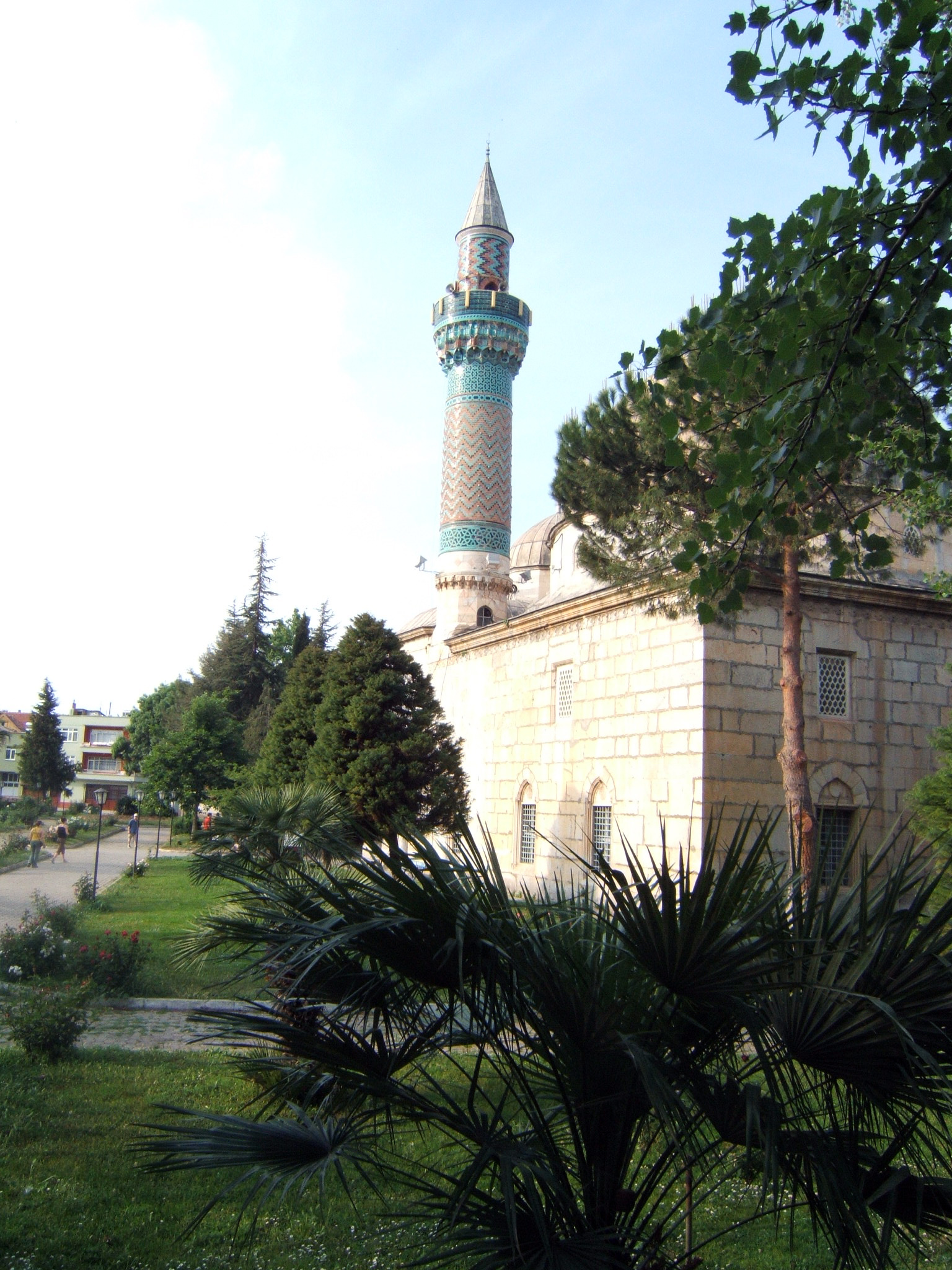 La mosquée Yesil Camii à Iznik (Nicée)